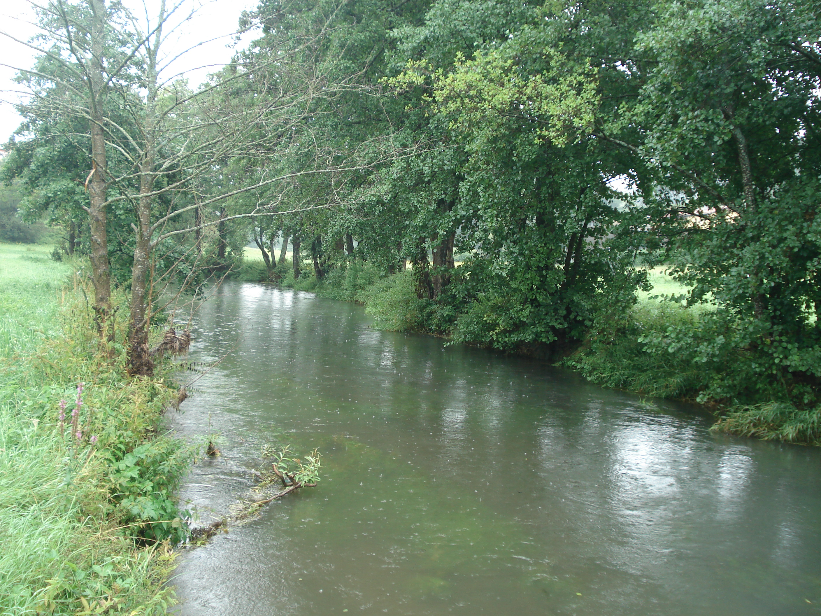 Die Schwarze Laber bei Parsberg